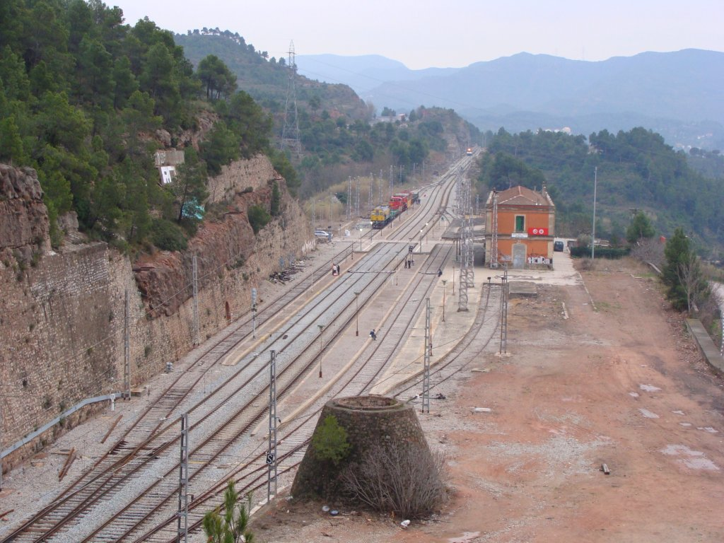 Entre els cables de la catenaria, es pot veure la circulació especial Can Tunis - Rajadell estacionada a l'estació de Castellbell i el Vilar - Monistrol de Montserrat, mentre una unitat 447 en direcció Manresa s'aproxima.